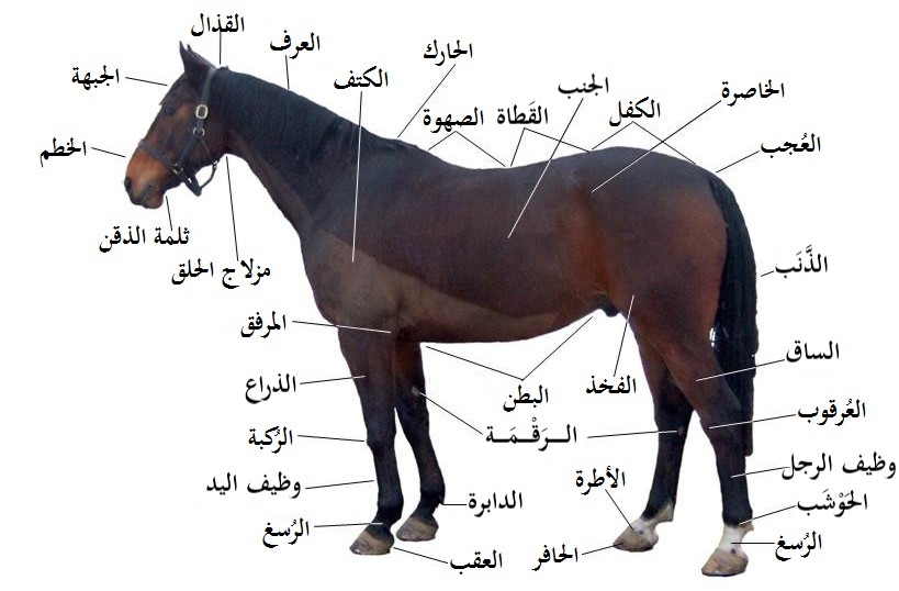 الأقسام الخارجيَّة من جسد الحصان.